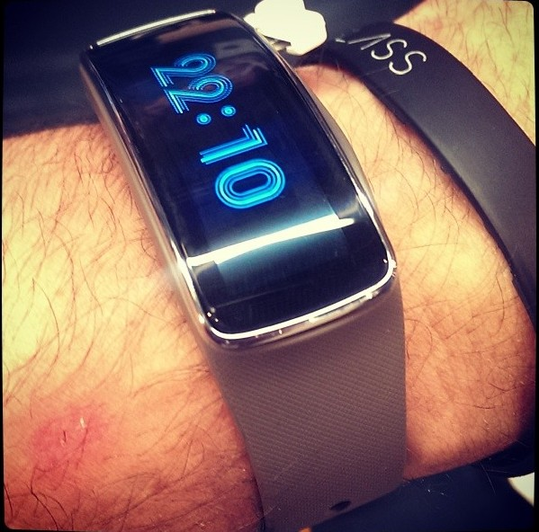 очень мне понравился, пока я не сообразил, что время мне придется все время считывать под углом в 90 градусов. И не только время.